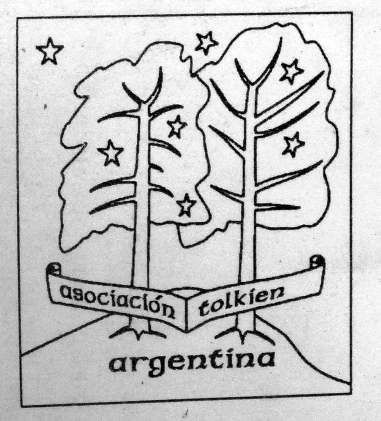 Primer logo de la Asociación Tolkien Argentina. Fotografía del impreso en revista Mathoms, Boletín de la Asociación Tolkien Argentina, "Esperanza" Año 5, Número 6, Julio de 1999, tal como figura en la contraportada de la misma.